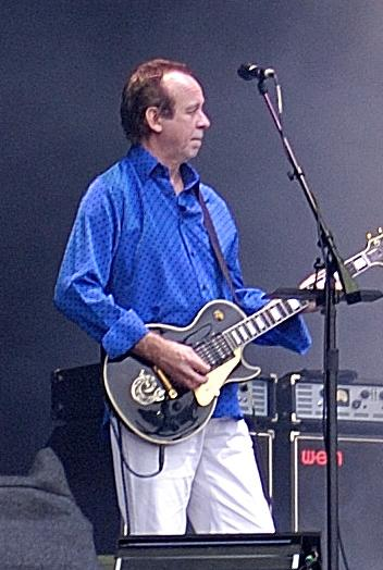 Phil Manzanera, durante un concierto en Munich, en 2006.